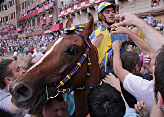 Contradaioli della Tartuca festeggiano il cavallo e il fantino vittoriosi a luglio 2009.